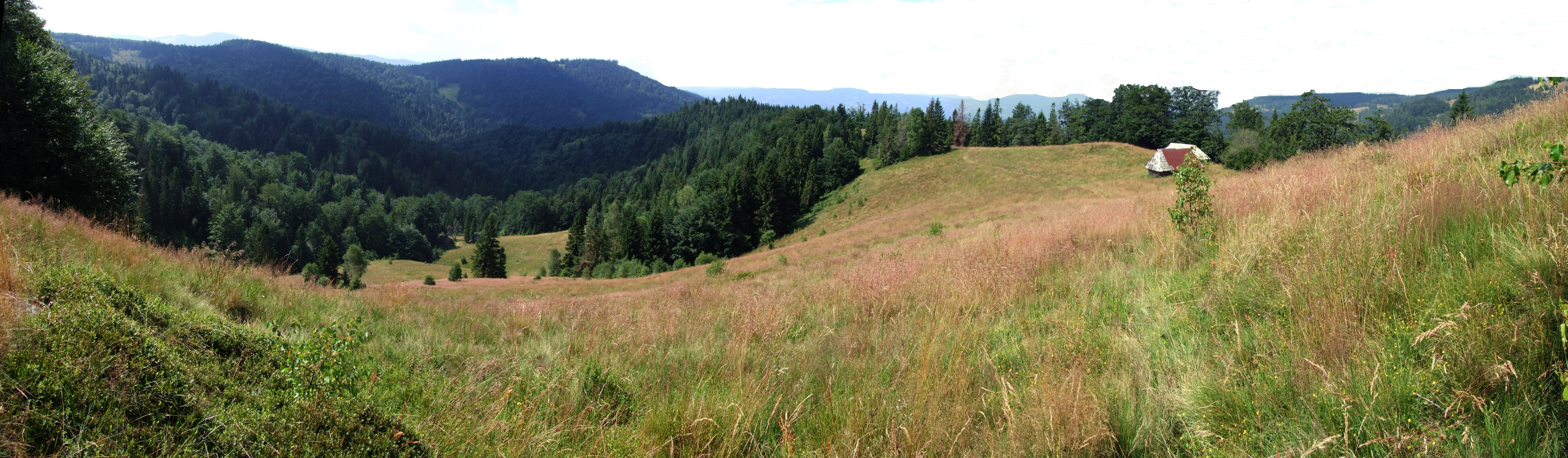 Hala Skotarka w Paśmie Jaworzyny Krynickiej. Panorama